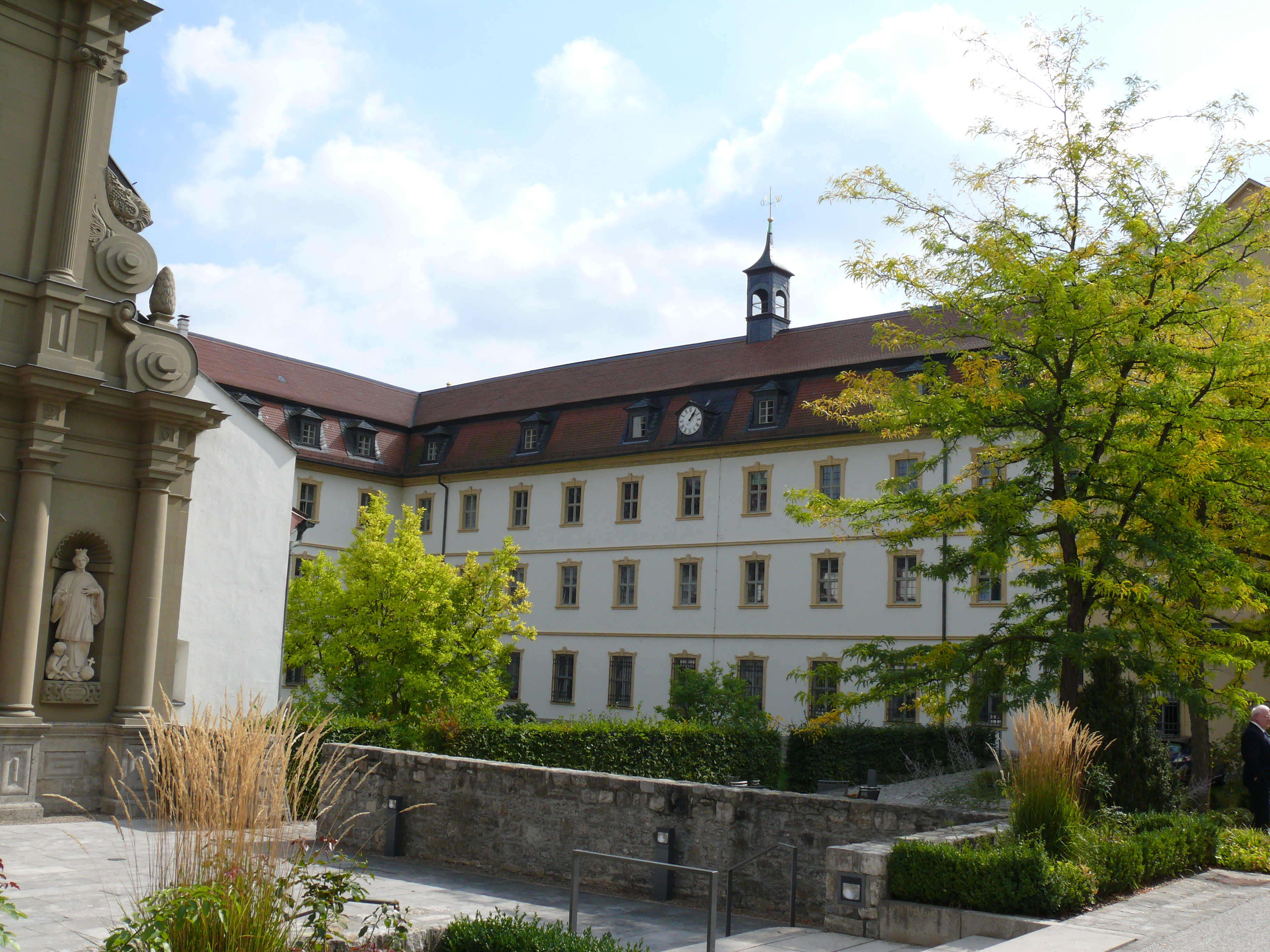 Kloster Oberzell, Zell am MainThis is a photograph of an architectural monument.